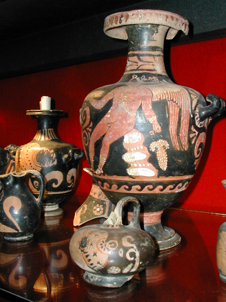 Nombre de archivo :DSCN2320.JPG Tamaño de archivo :386.8 KB (396098 Bytes) Fecha de entrega :0000/00/00 00:00:00 Tamaño de imagen :1600 x 1200 Resolución :300 x 300 ppp Número de bits :canal de 8 bits Atributo Protección :Desactivado Atributo Ocultar :Desactivado ID de la cámara :N/A Cámara :E775 Modo Calidad :NORMAL Modo Medición :Multipatrón Modo Exposición :Automático programado Speed light :Sí Distancia focal :7.6 mm Velocidad del disparador :1/59.6segundo Abertura :F3.1 Compensación de exposición :0 EV Balance del blanco fijo :Automático Objetivo :Incorporado Modo de sincronización del flash :Cortina delantera Diferencia de exposición :N/A Programa flexible :N/A Sensibilidad :Auto Nitidez :Automático Tipo de imagen :COLOR Modo de Color :N/A Ajuste de tonos :N/A Control de saturación :N/A Compensación de tono :NORMAL Latitud (GPS) :N/A Longitud (GPS) :N/A Altitud (GPS) :N/A